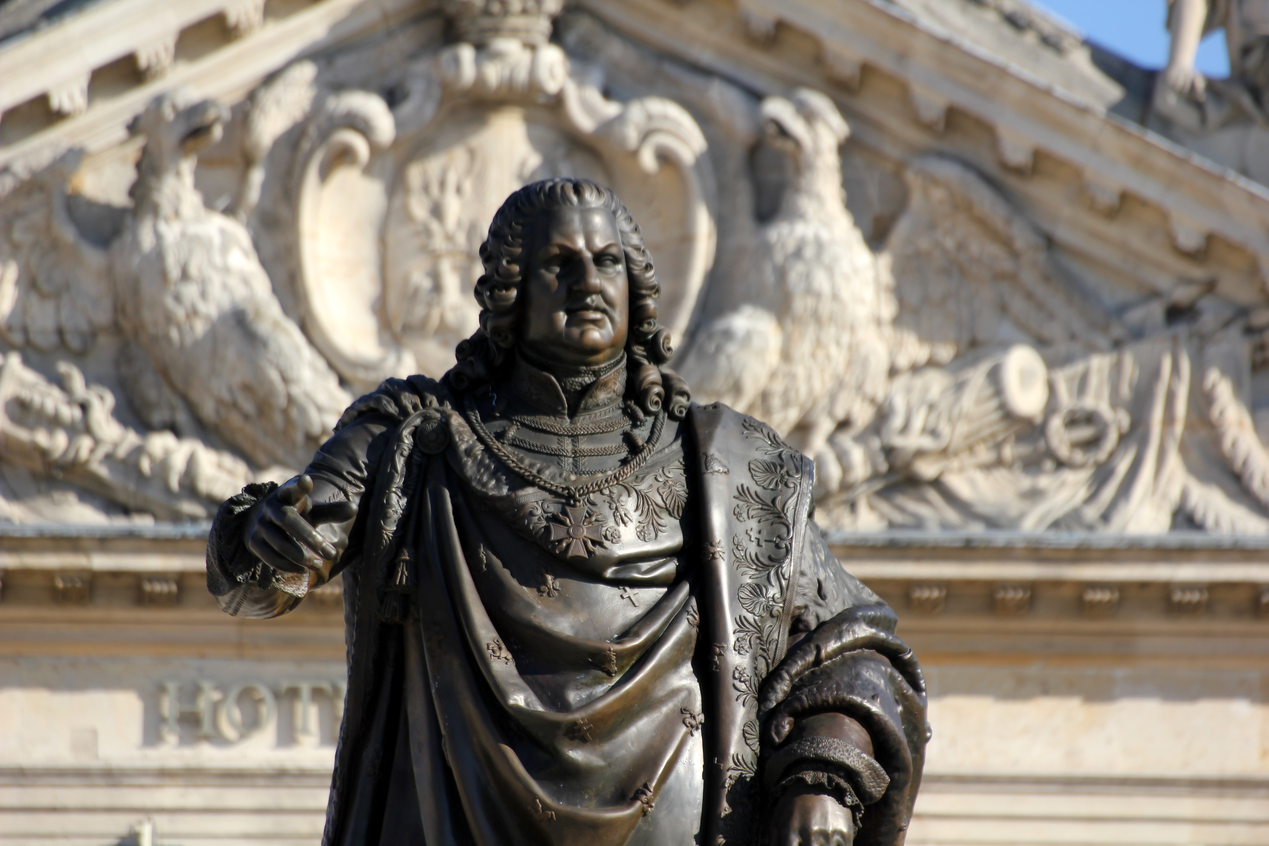 Statue du roi Stanislas au centre de la Place Stanislas